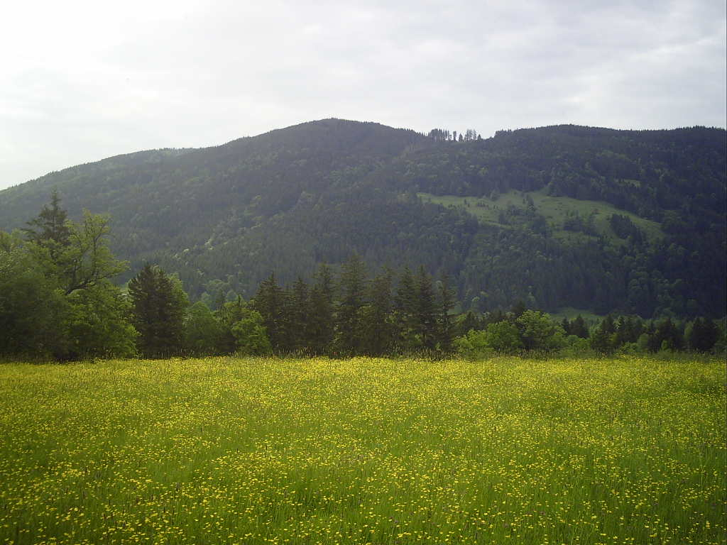 Rechelkopf